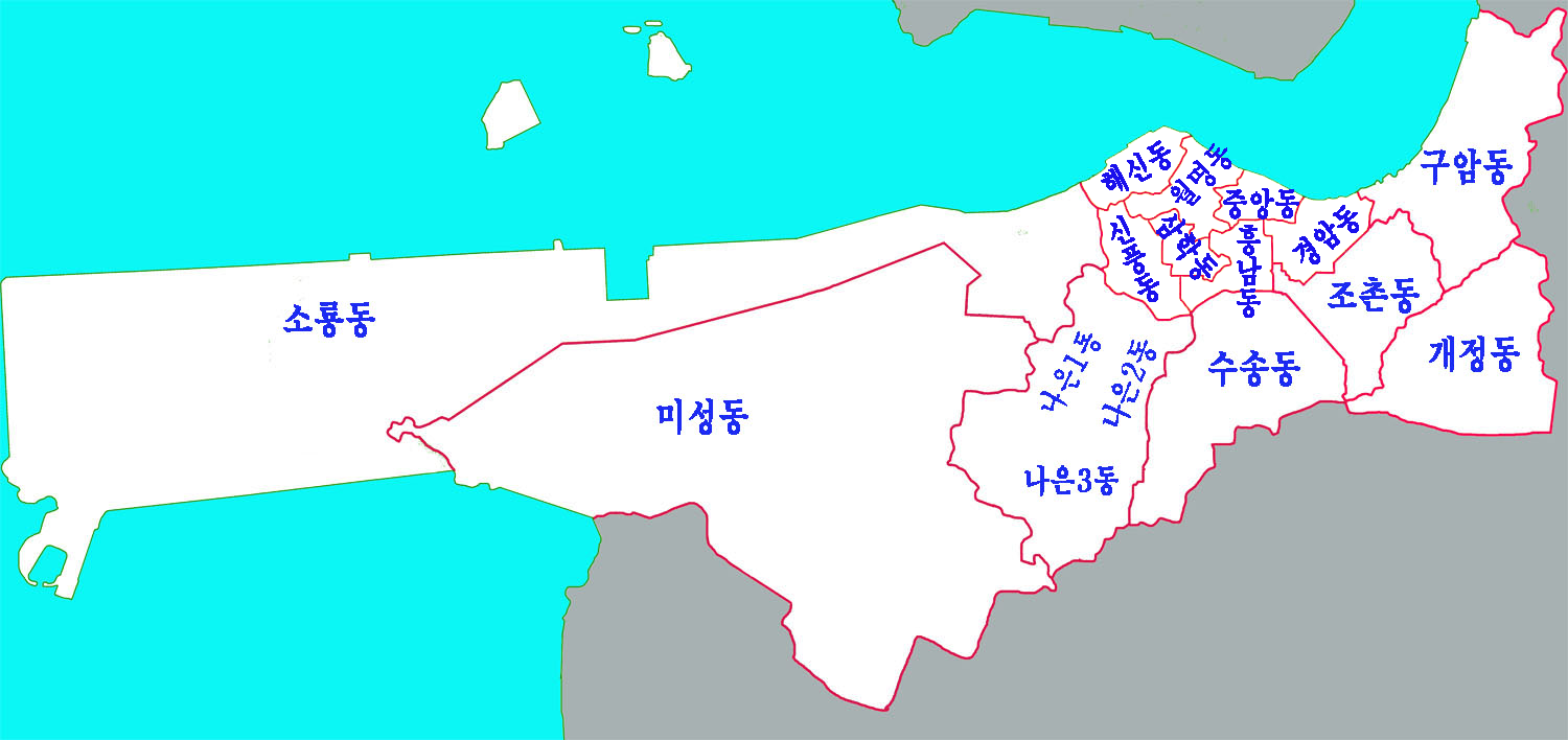 군산시 시내동구역